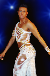 Das Bild stellt den türkischen Bauchtänzer Zadiel aus Berlin dar.